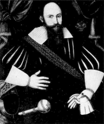 Henrik Klasson Fleming